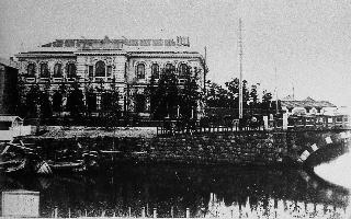 後藤象二郎の蓬莱社本社 1872年 木挽町7丁目（現在の銀座八丁目13番銀座三井ビル付近）